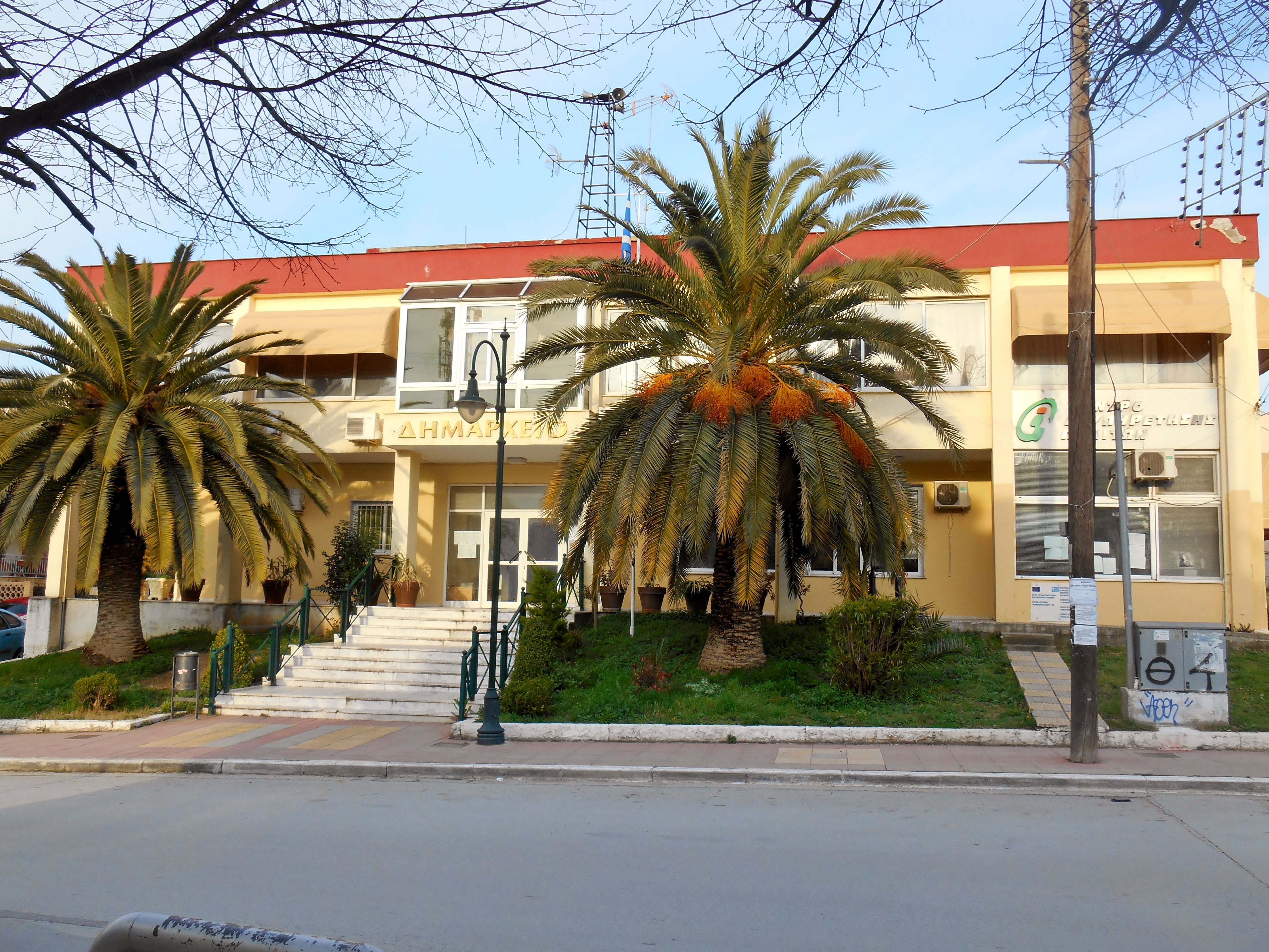 Νέα Μηχανιώνα.